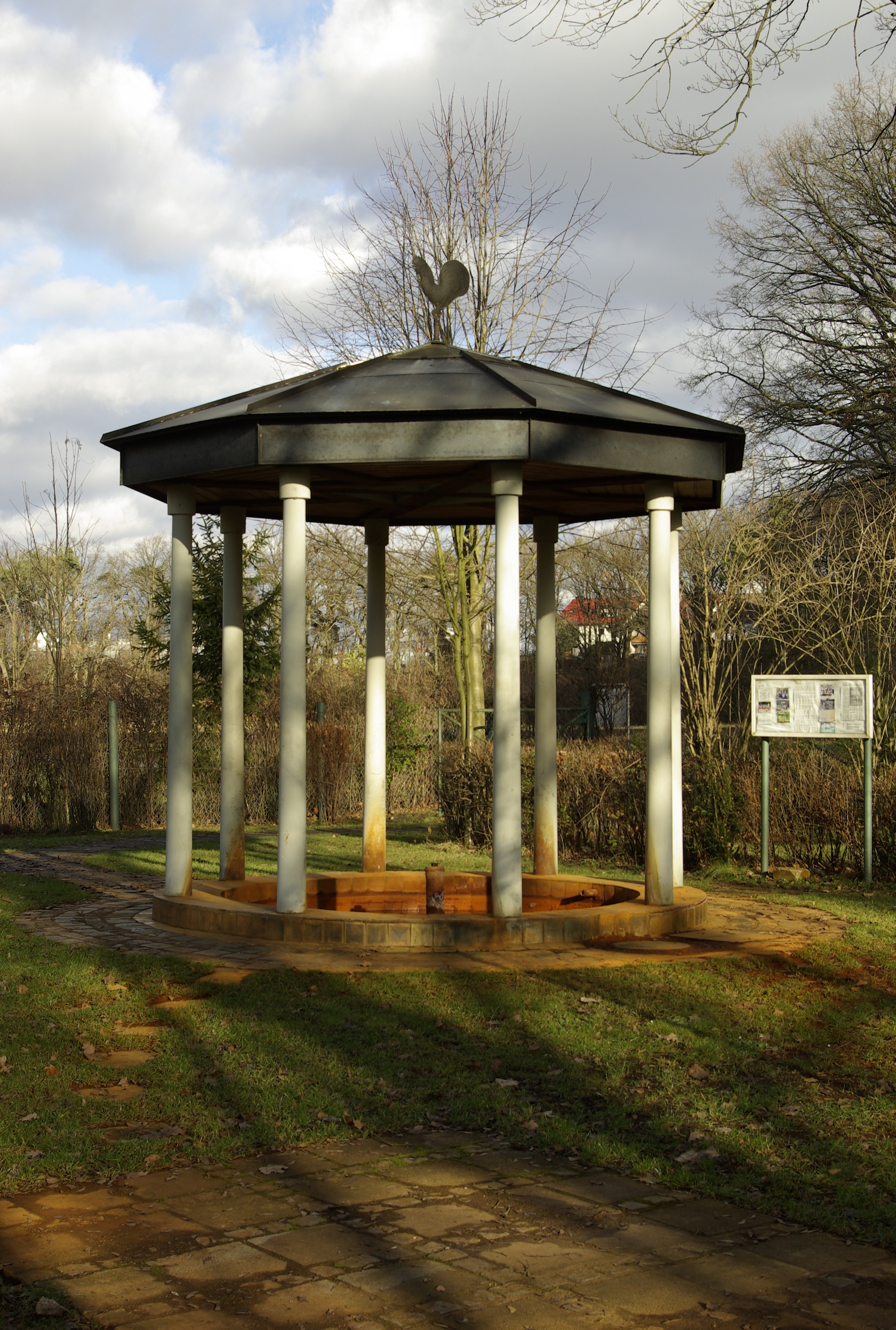 Die Gustav-Adolf-Quelle im Fürther Stadtteil Weikershof